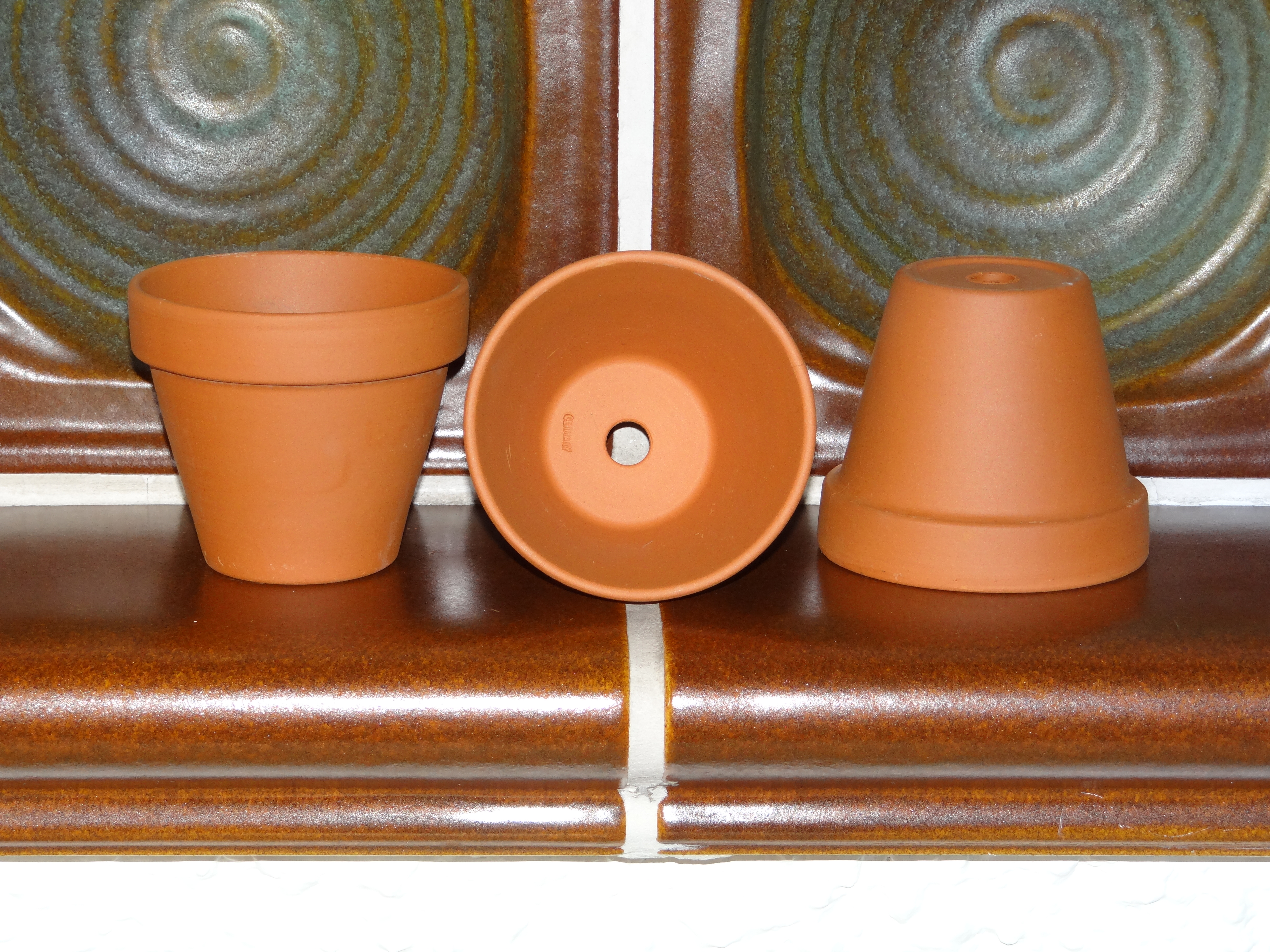 BLT 10cm